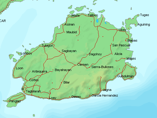 Karte von Bohol, einer Insel der Philippinen.